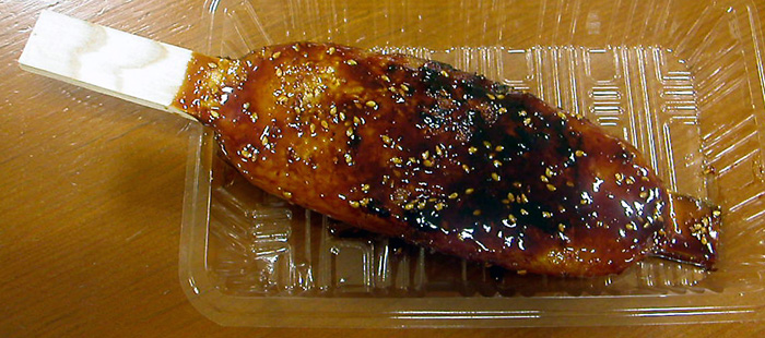 撮影者：小太刀 五平餅。餅とはいってもご飯を潰し甘い味噌ダレをつけて焼いたものです。餅米を混ぜることもあります。米のつぶつぶが少し残っています。といっても、おにぎりほどはっきりしたつぶつぶではありません。